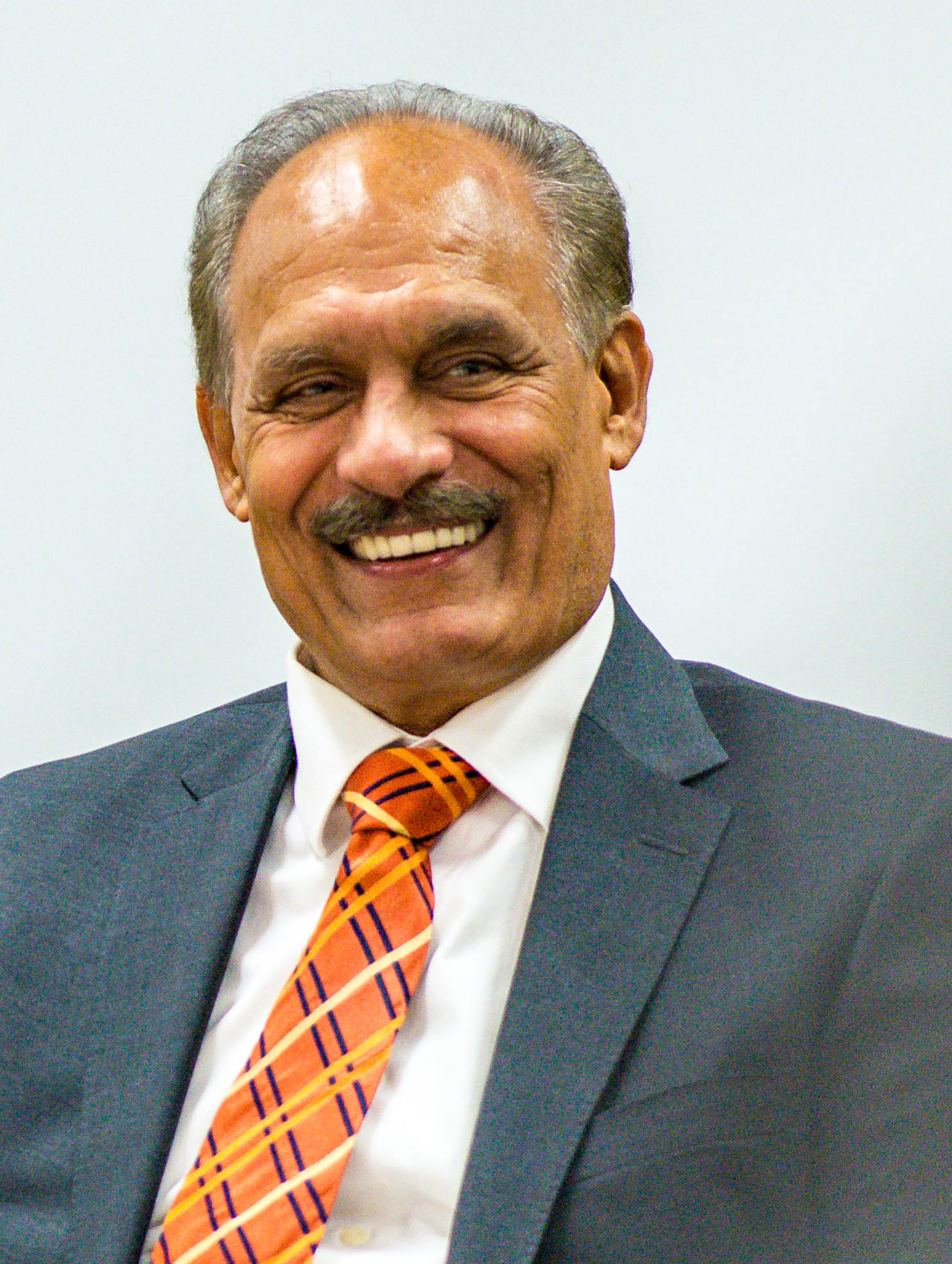 MP Jati Sidhu meeting at UFV